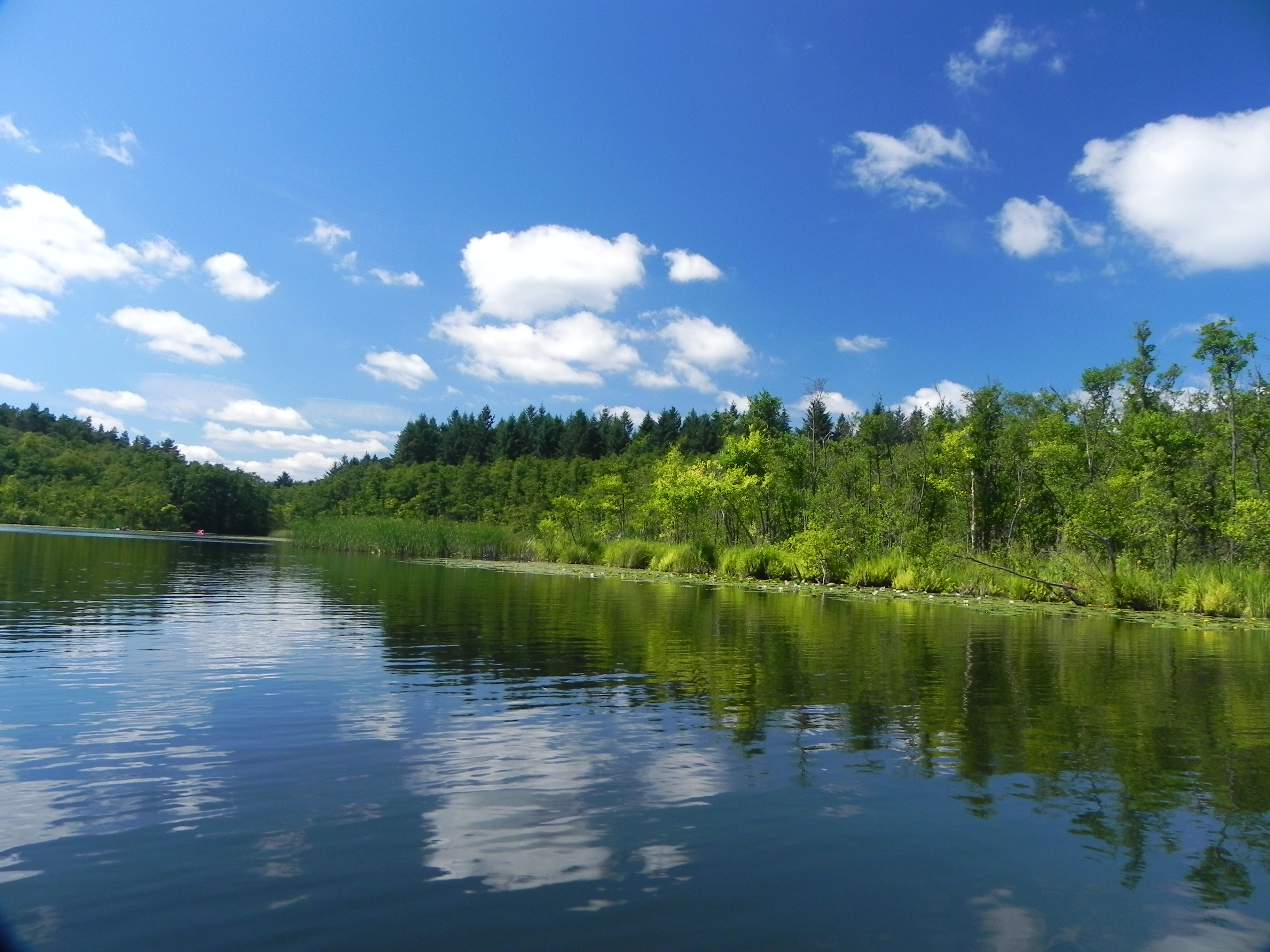 Landschaftsschutzgebiet „Neustrelitzer Kleinseenplatte“ (LSG L38) in Mecklenburg-Vorpommern: Die Dollbek zwischen Gobenowsee und Labussee.